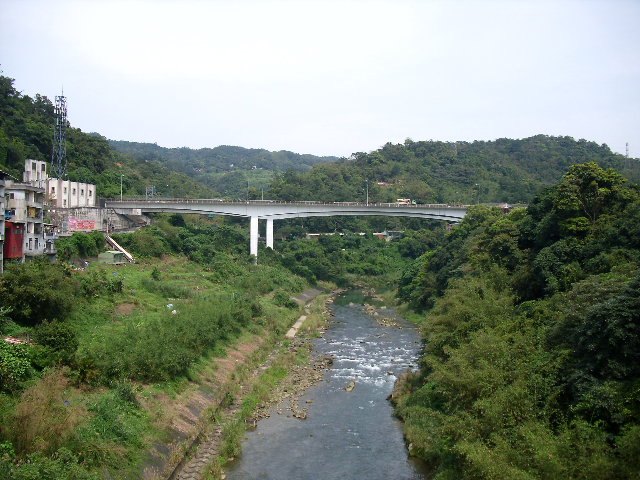 Bân-lâm-gú: 蔣渭水高速公路石碇高架橋，下跤是梘尾溪，我儂徛佇楓林橋翕的。